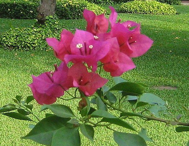 Buganvillia o buganvilia o buganbilia de Coatzacualcos, Veracruz; (Bougainvillea glabra).